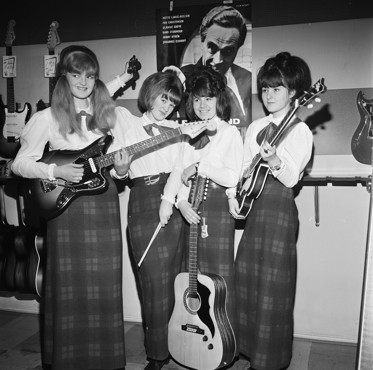 The Dandy Girls er en tidligere norsk musikkgruppe. De er Norges første alljente rock'n roll band, og er sånn sett en pionér innen norsk musikk.